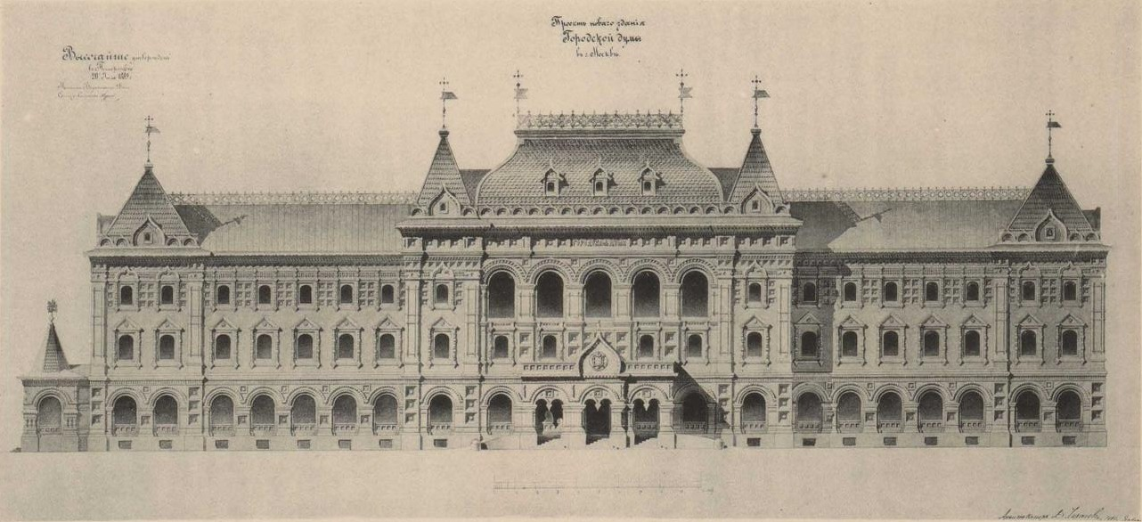 Проект здания Московской городской думы